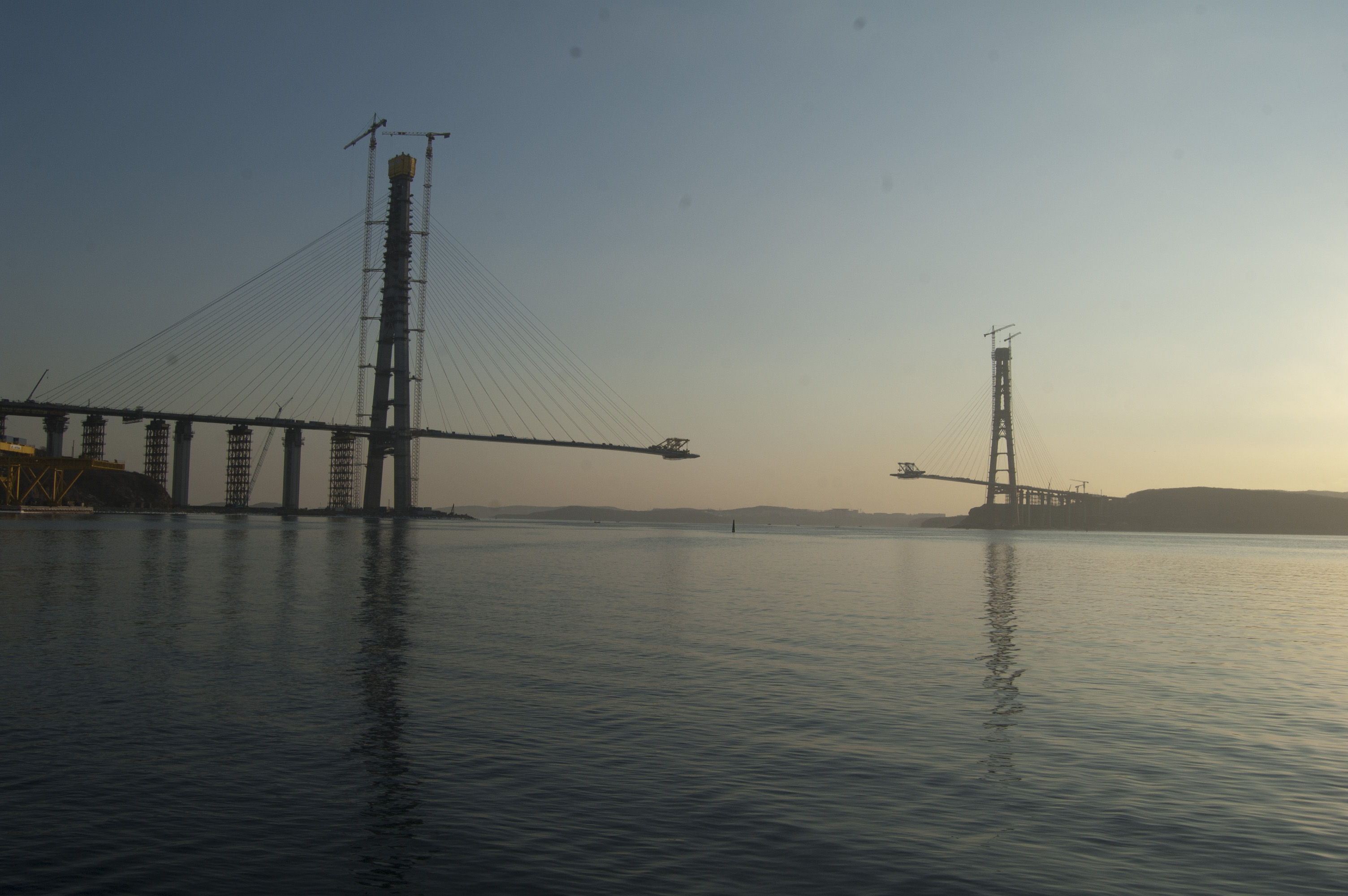 вид на мост конец 2011